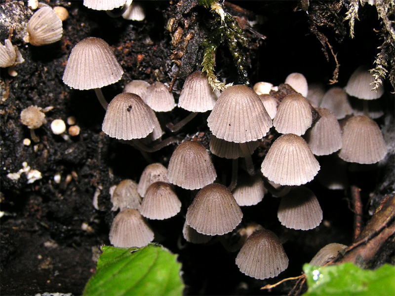 Coprinellus disseminatus - Coprinaceae